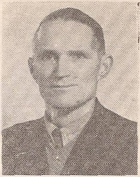 Grzegorz Ziemcow (1896-1969), działacz baptystyczny (1939-1945), zielonoświątkowy (1945-1949), zielonoświątkowców niezarejestrowanych